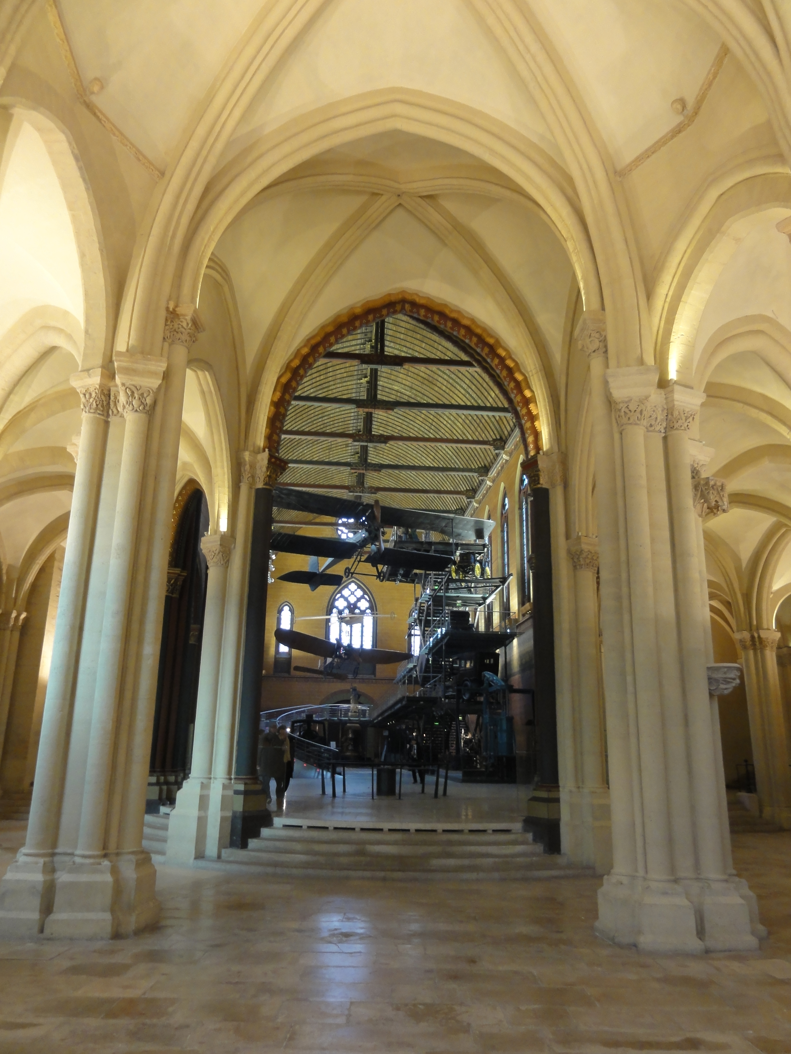 Chapelle d'axe, vue vers l'ouest.